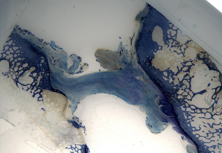 Histologie des geheilten Kreuzbandes im Schafmodell